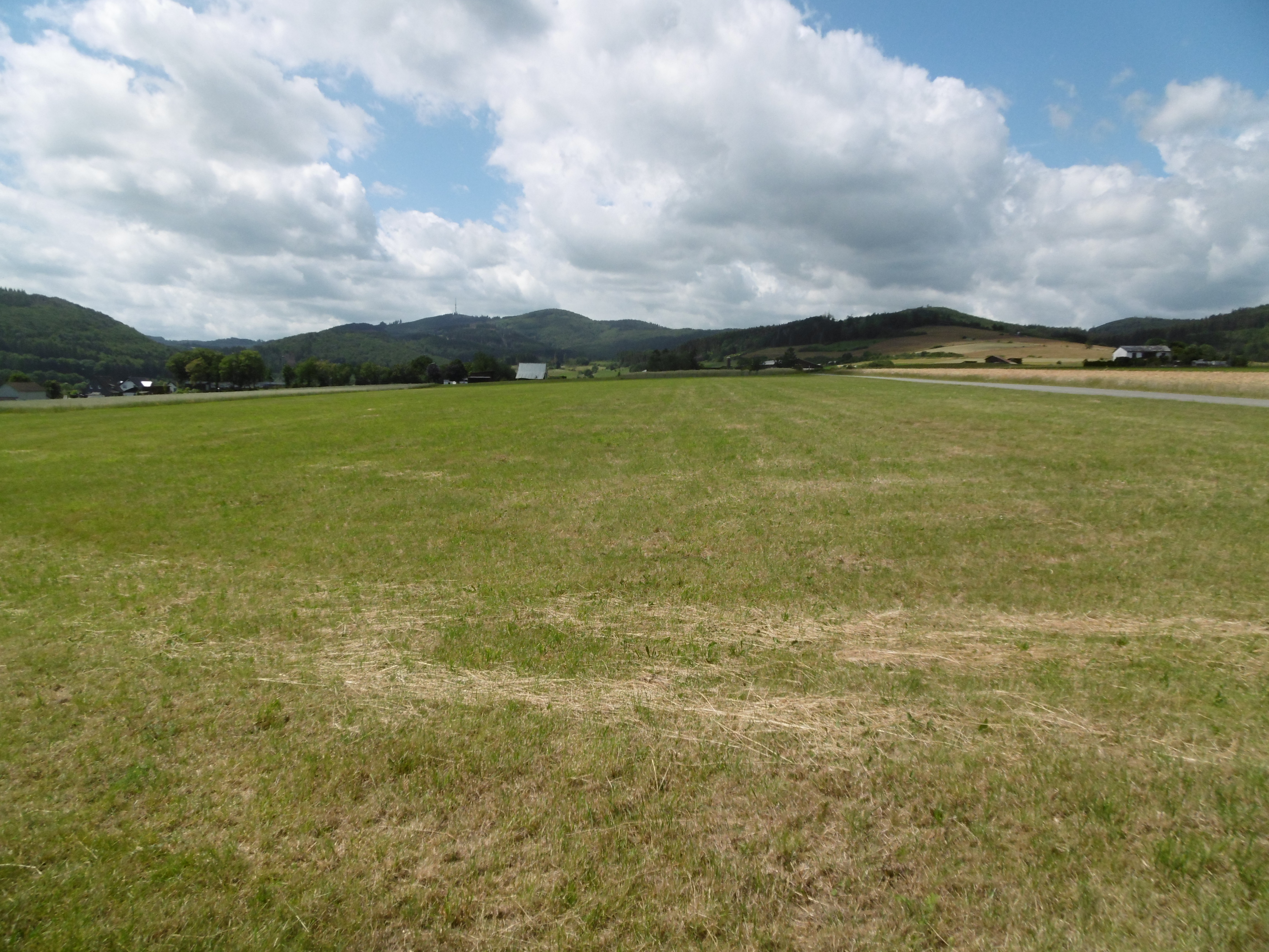 Landschaftsschutzgebiet Kulturlandschaftskomplex Medelon mit Blick Richtung Medelon.